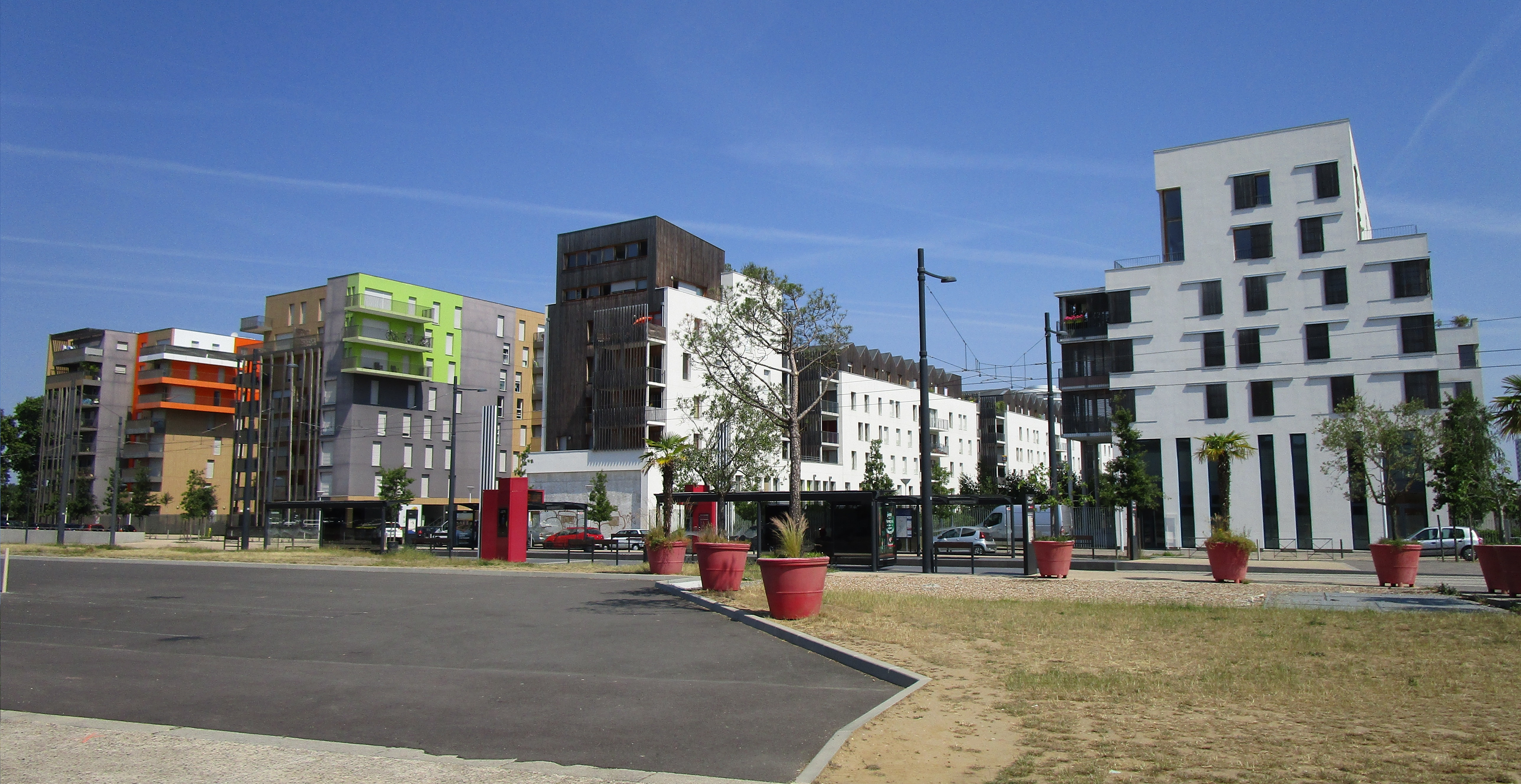 Immeubles sur l'allée Ferdinand de Lesseps, dans le quartier des Deux-Lions de Tours. Maisons blanches (livrée en 2011, 200 logements) à droite et résidence Terrasses de la Gloriette en construction (livrée en 2011, 116 logements) à gauche.